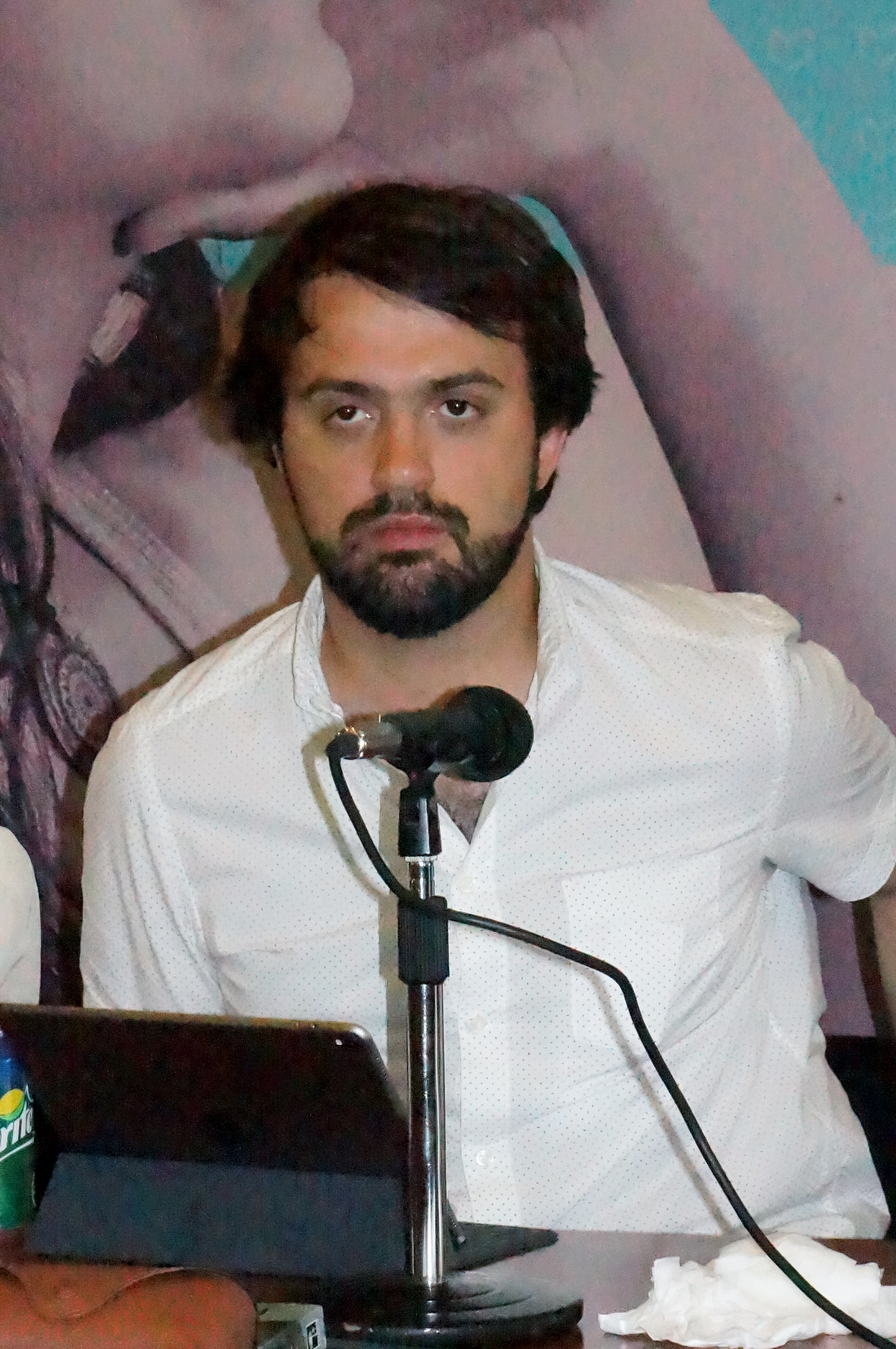 El político y abogado chileno Jorge Sharp en la Feria Internacional del Libro de Santiago el 11 de noviembre de 2017 durante la presentación del libro Mujeres en el MIR. Desarmando la memoria, de Margarita Fernández y Patricia Flores.